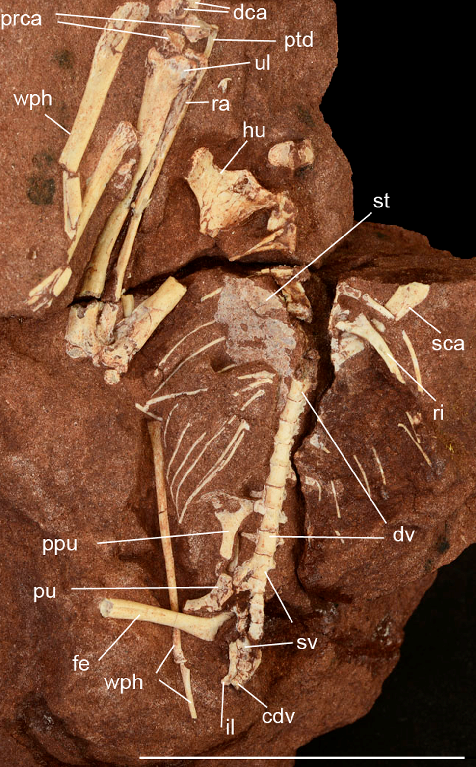 Caiuajara dobruskii gen. et sp. nov., (CP.V 869), partial articulated skeleton. Scale bar equals 50: cdv, caudal vertebrae; dca, distal carpal series; dv, dorsal vertebrae; fe, femur; hu, humerus; il, ilium; prca, proximal carpal series; ptd, pteroid; ppu, prepubis; pu, pubis; ra, radius; ri, ribs; sca, scapula; st, sternum; sv, sacral vertebrae; ul, ulna; wph, wing phalanx.